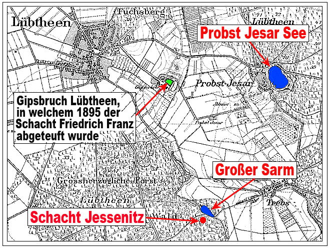 Lage des Schachtes Jessenitz sowie wassererfüllter Pingen